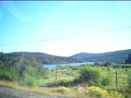 Vista del embalse Tutuvén desde el camino entre Cauquenes y Chanco.